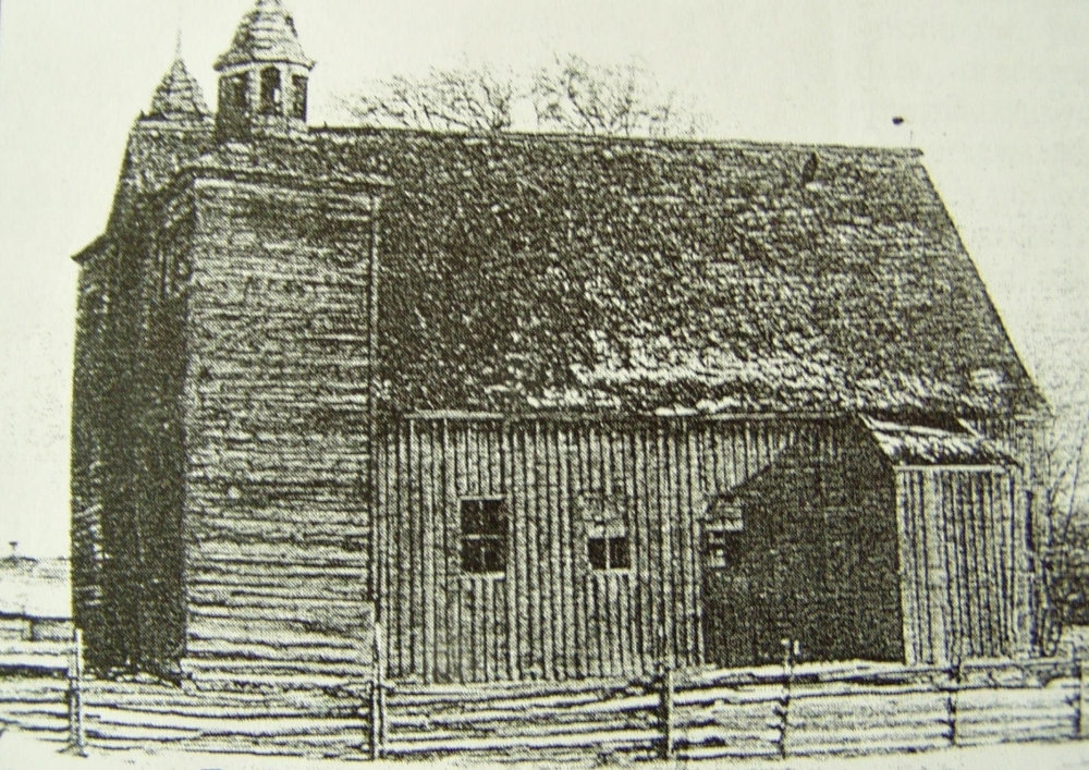 Беларуская (тарашкевіца): Прывалка (Pryvałka). Касьцёл